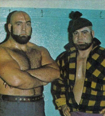 Les frères Leduc en couverture du magazine de catch Wrestling Revue en juin 1973.